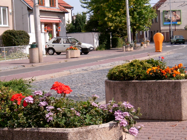 Brno-Komín, ulice Hlavní, léto 2004, pohled od Staré Hasičky k řeznictví